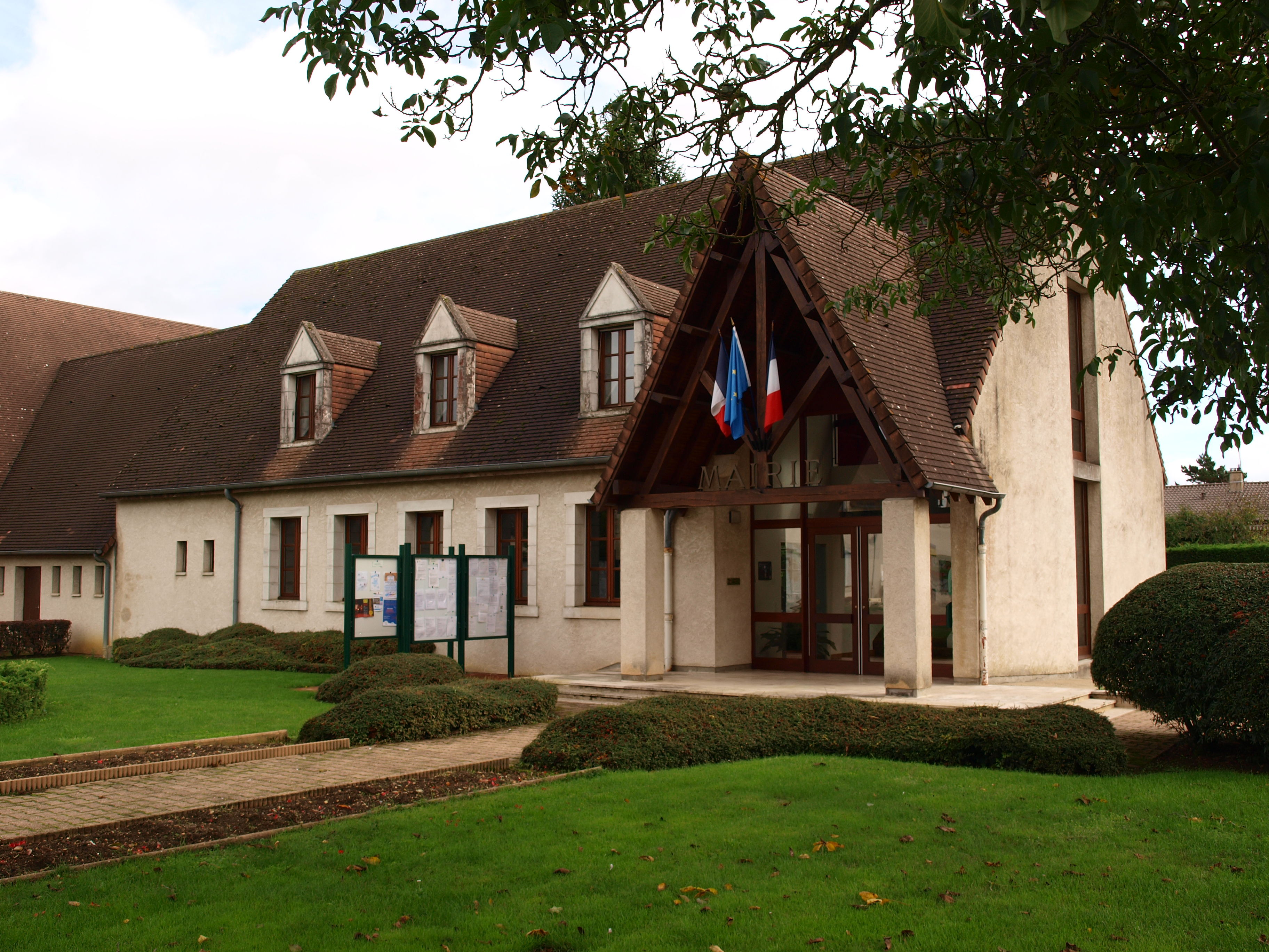 Étrechet (Indre, France) ; mairie